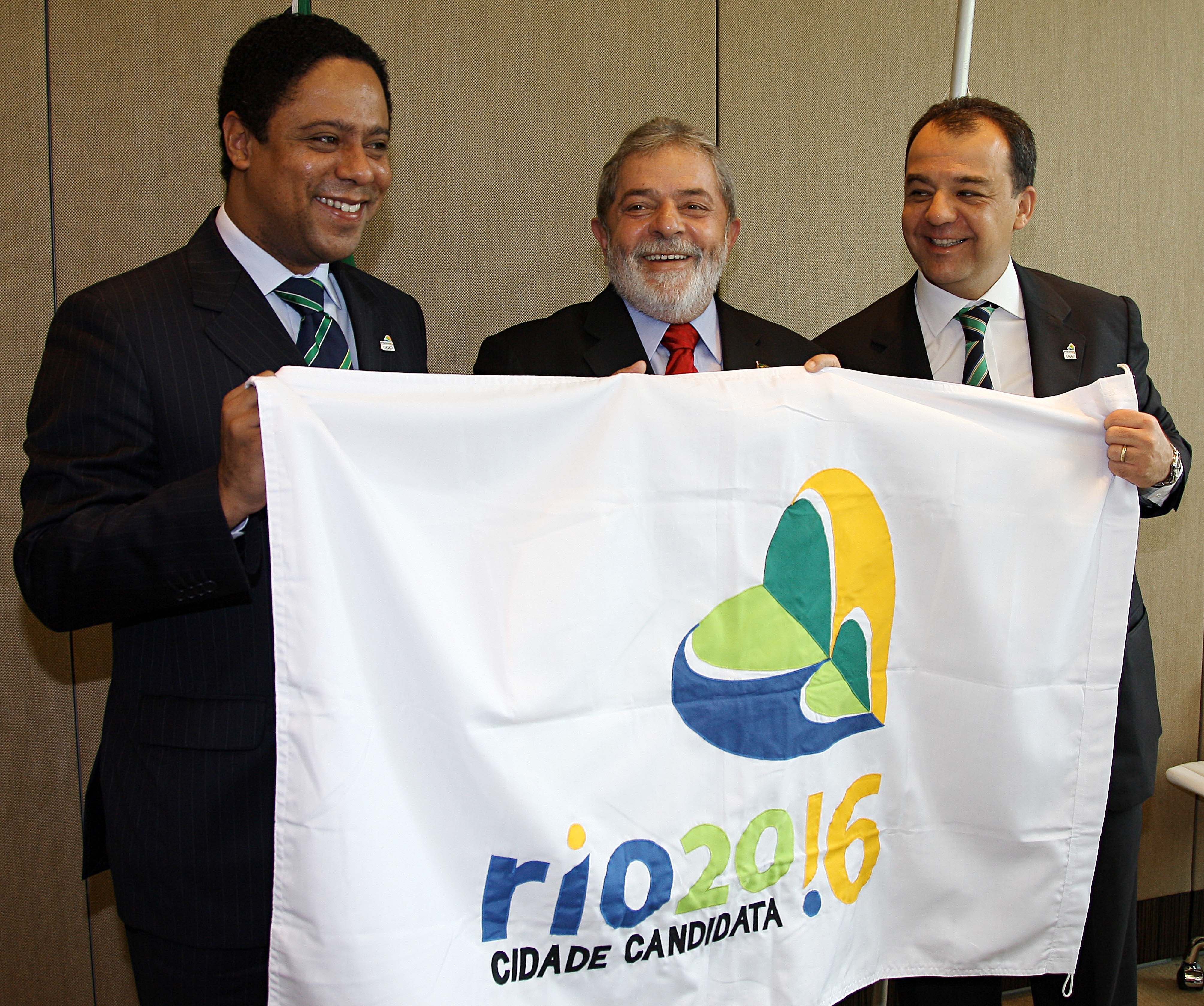 Genebra (Suíça) - O ministro do Esporte, Orlando Silva, o presidente Luiz Inácio Lula da Silva e o governador do Rio de Janeiro, Sérgio Cabral, defendem, em Genebra, a candidatura do Rio como sede das Olimpíadas de 2016.